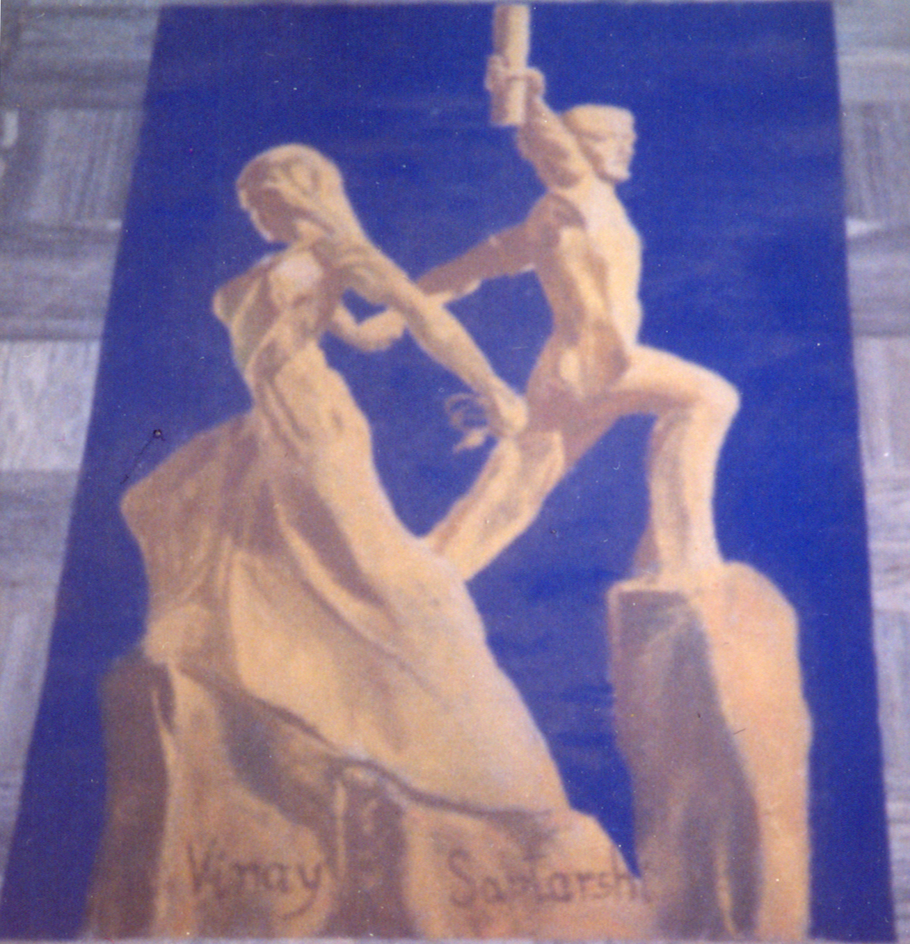 विवरण:लकड़ी के बुरादे और सूखे रंगों से बनी रंगोली, कलाकार हैं डॉ. सप्तर्षि मंडल और डॉ. विनय महाजन। इस रंगोली का आकार 12 फुट x 18फुट है। इसे 1999 में नई दिल्ली के जवाहरलाल नेहरू के फॉयर ऑफ़ एम्स सभागार में बनाया गया था। Technique: Rangoli (hand sprinkling of powder on floor) Material: Saw dust mixed with powder pigments Artist: Dr. Saptarshi Mandal & Dr. Vinay Mahajan Size: 12feet x 18feet Year: 1999 Place: Jawharlal Nehru Auditorium Foyer of AIIMS, New Delhi